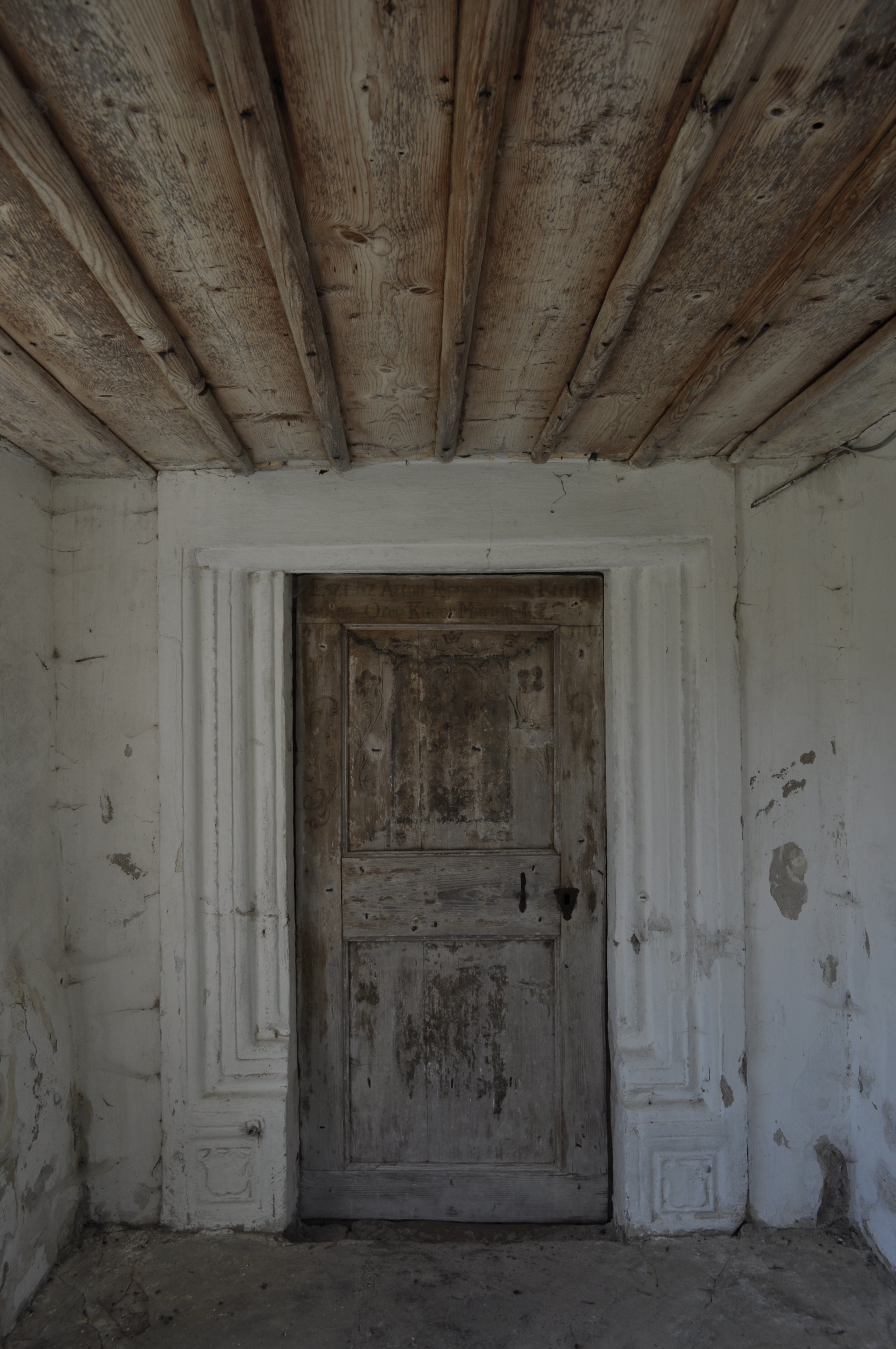 Biserica reformată, sat SFĂRAŞ; comuna ALMAŞU 01